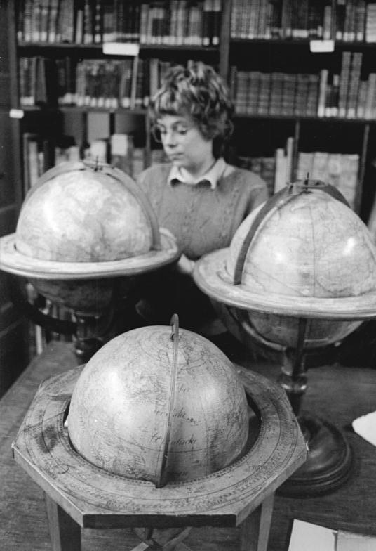 Leipzig, Geographischen Zentralbibliothek, Globensammlung ADN-ZB Grubitzsch 19.10.89 Leipzig: Seltene historische Globen wie dieser Himmelsglobus aus dem Jahre 1798 von dem Franzosen Fortune gehören zum kostbaren Bestand der Geographischen Zentralbibliothek Leipzig. Die Globen sind in internationalen Katalogen erfaßt, die in Wien geführt werden. Mit rund 170.000 Büchern zählt die Leipziger Bibliothek zu den größten derartigen Einrichtungen in Europa. Die Sammlung wird sowohl von Wissenschaftlern als auch von Heimatforschern, Orts- und Hobbychronisten genutzt. (siehe 8N)